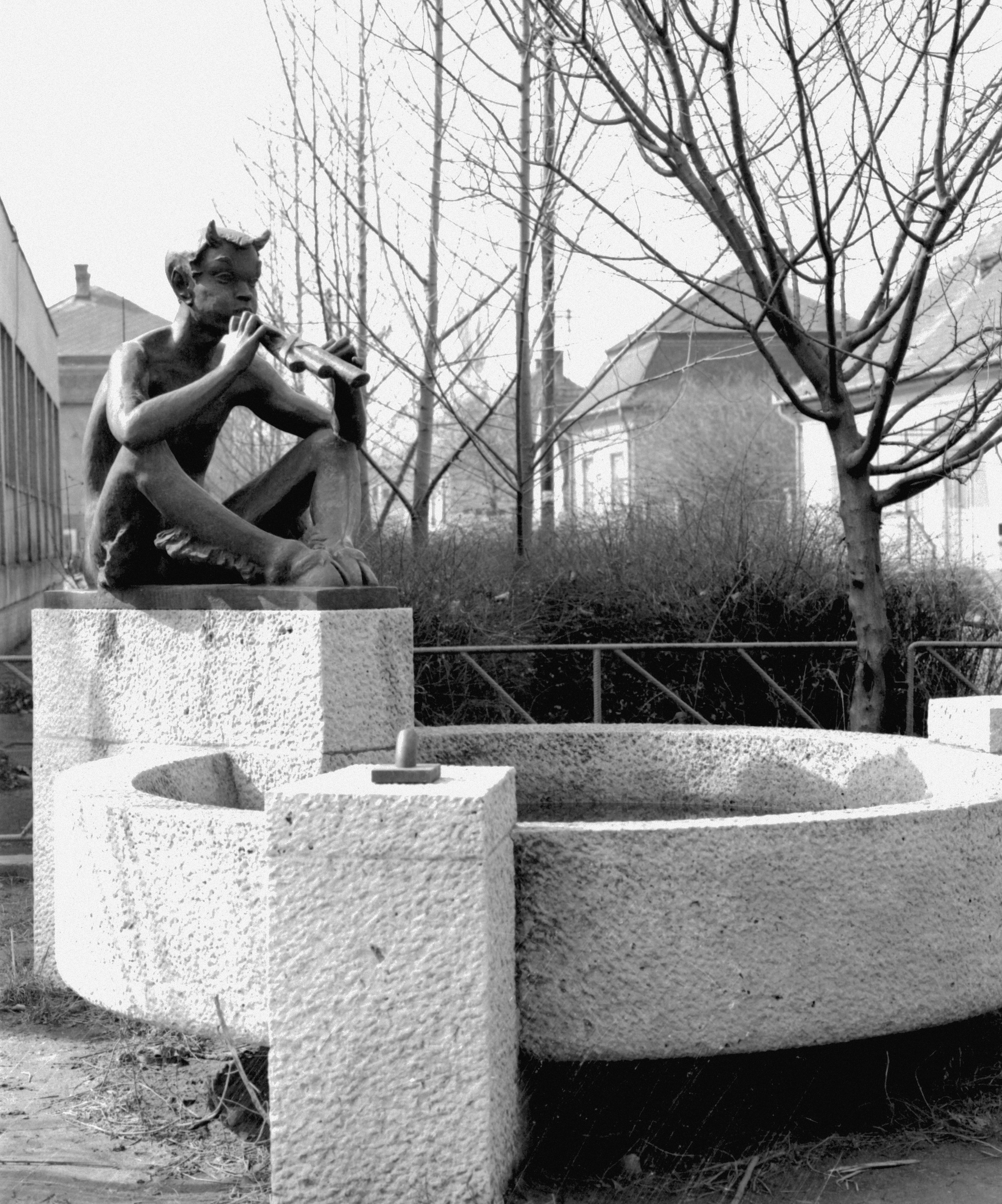 Vasút utca a Szakorvosi Rendelőintézet előtt. Faun-szobor (Boldogfai Farkas Sándor, 1968-as alkotása, ma a Millecentenáriumi Emlékparkban található). Location: Hungary, Dunavecse Title: Vasút utca a Szakorvosi Rendelőintézet előtt. Faun-szobor (Boldogfai Farkas Sándor, 1968-as alkotása, ma a Millecentenáriumi Emlékparkban található).